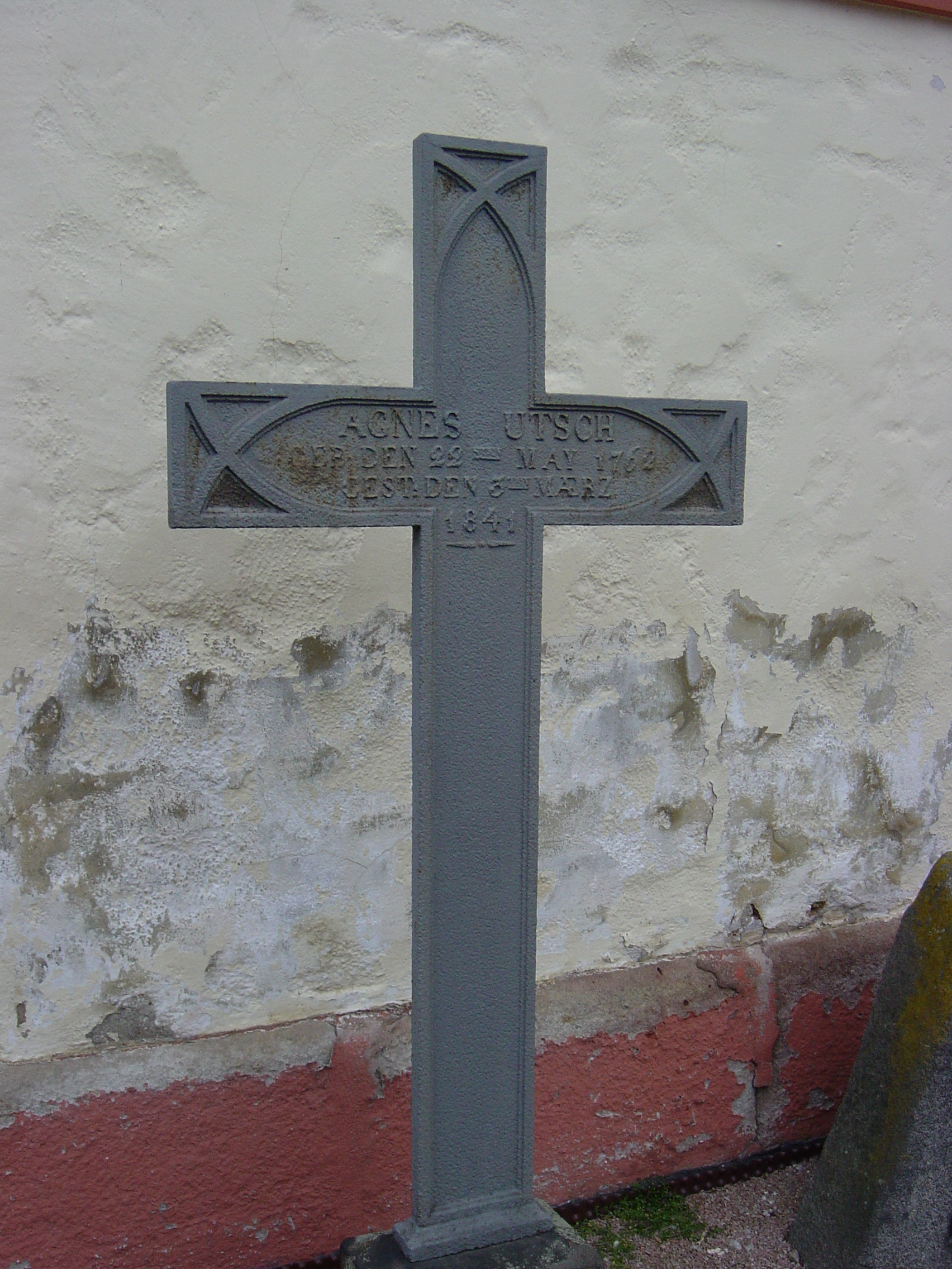 gusseisernes Grabkreuz Agnes Utsch (22.05.1762-3.08.1841); Standort Bretzenheim, Friedhof der katholische Pfarrkirche Mariä Geburt in der Kirchstraße 20. Sie war die Schwester von Margarethe Utsch. Beide waren Kinder von Friedrich Wilhelm Utsch (1732-1795), dem Besitzer der Rheinböllerhütte und legendären "Jägers aus Kurpfalz". Margarethe Utsch heiratete Carl I. Puricelli, dessen Vorfahren vom Comer See einwanderten. Das Ehepaar Puricelli-Utsch stellten den Beginn der industriellen Tätigkeit der Familie Puricelli in der Nahe-Hunsrück-Region dar und bildeten die Grundlage des späteren Wohlstandes. Besonders die früh verwitwete Margarethe Puriclli geborene Utsch wurde nach dem frühen Ableben ihres Mannes Carl I. Puricelli die sehr erfolgreiche Managerin der Rheinböllenhütte. Dank ihres Wirkens konnten sich ihre Kinder zu sehr vermögenden Unternehmern entwickeln.